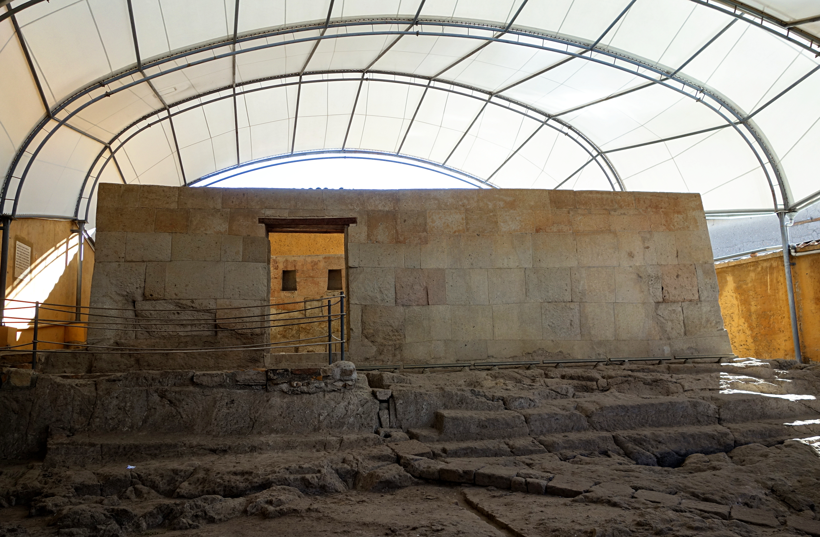 La Salle de la Rançon à Cajamarca.